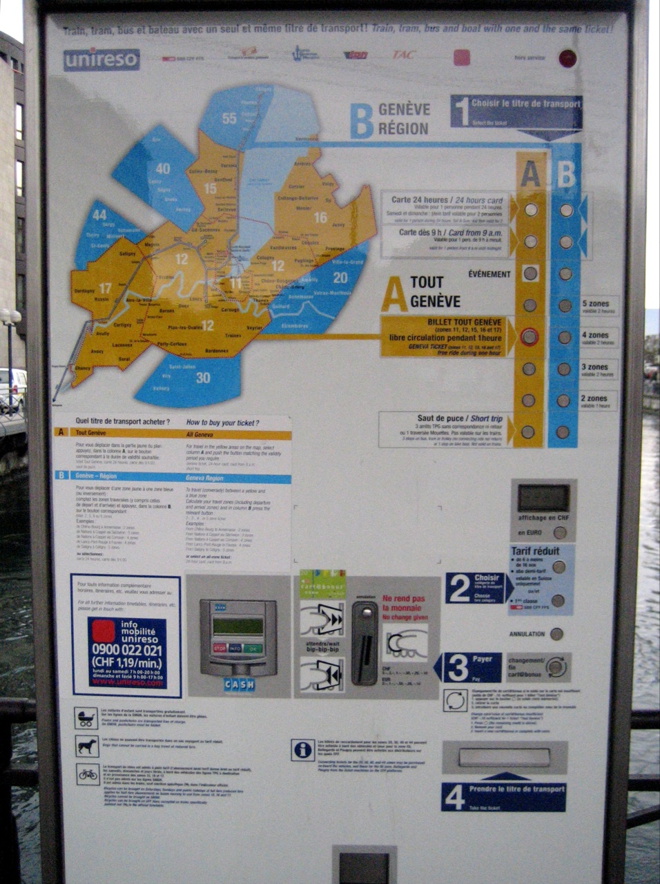 Automate à ticket pour les transports publiques genevois. Distributeur arborant l'ancien découpage zonal en vigueur entre 2004 et 2009.